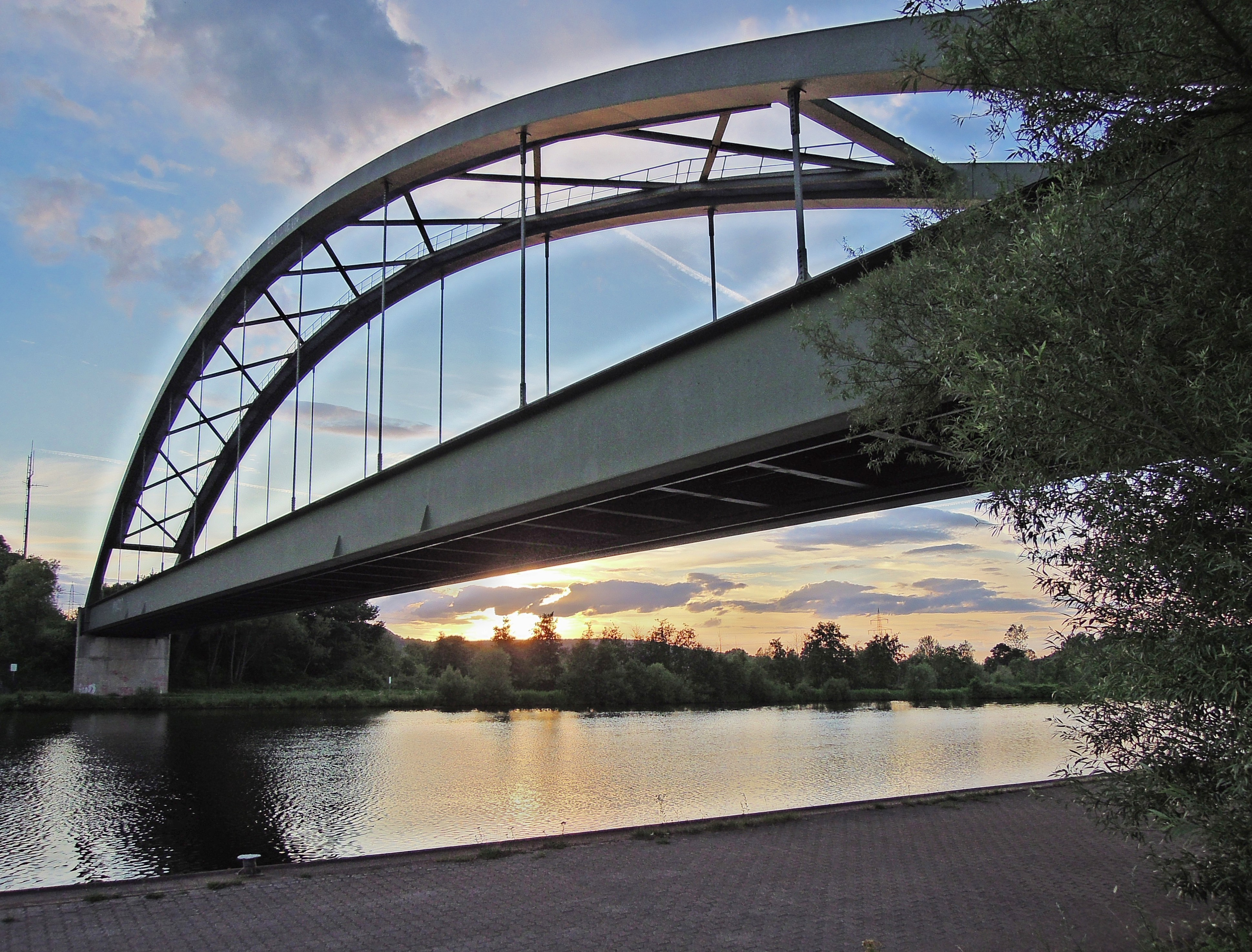 Eisenbahnbrücke von Dillingen nach Rehlingen